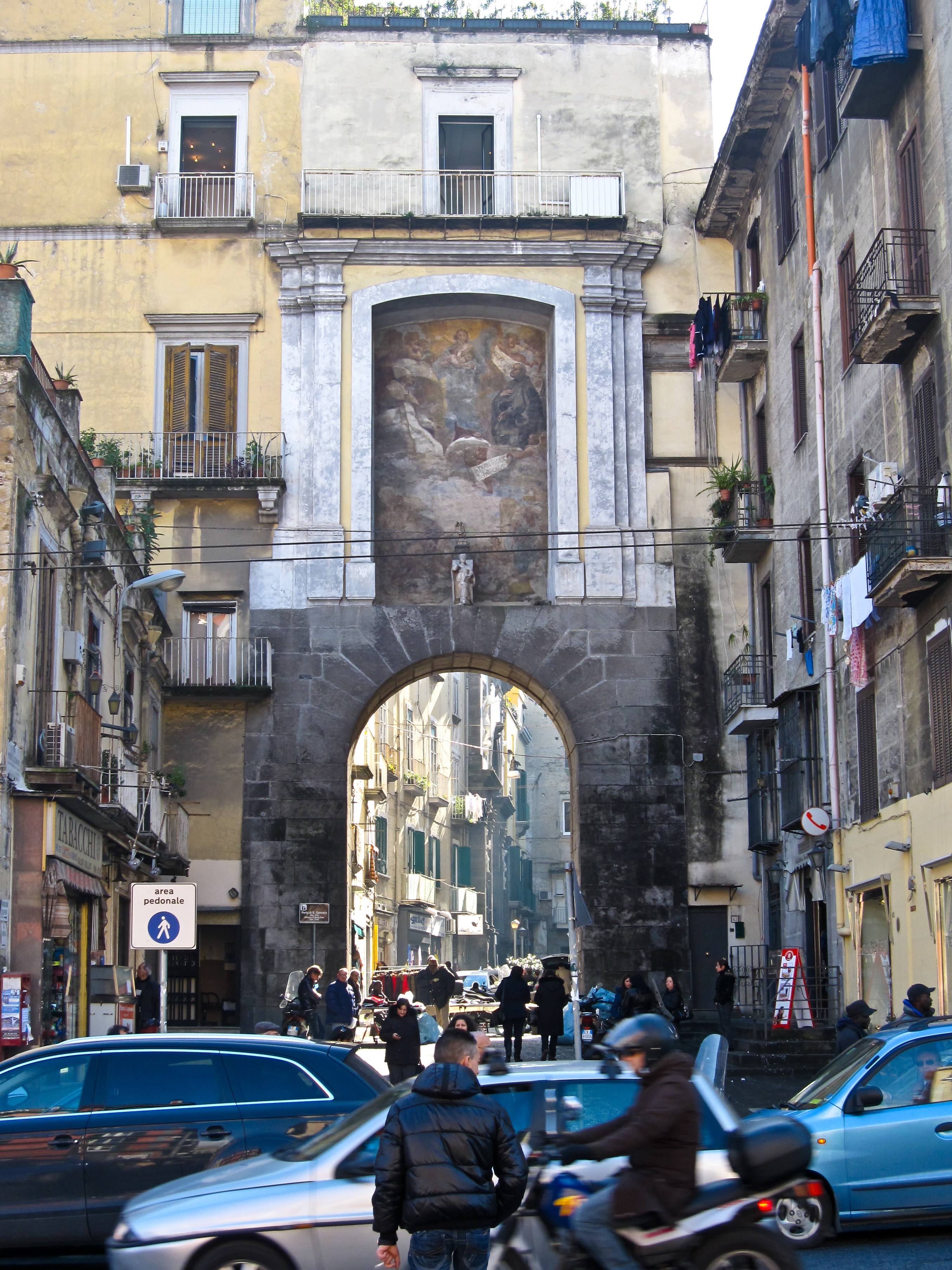 Napoli, tante città in una città. Partenope, Neapolis, la Napoli degli Angioini, la Napoli degli Aragonesi, la Napoli dei Borbone, la Napoli del Risorgimento....Napoli. Per questo suo risorgere continuo la necessità ed il fiorire delle sue porte di accesso. Oggi mi trovo in Via Foria davanti a Porta San Gennaro, la più antica (ci sono citazioni fin da prima dell'anno 1000). Una porta che nel tempo è stata spostata più volte, perdendo anche pezzi importanti della sua struttura come le torri di guardia. Dal 1537 è qui dove la si vede oggi. Qui mi sono ricordato che poco più avanti c'è un luogo legato ad un impegno preso e allora mi son detto: oggi è per gli amici!